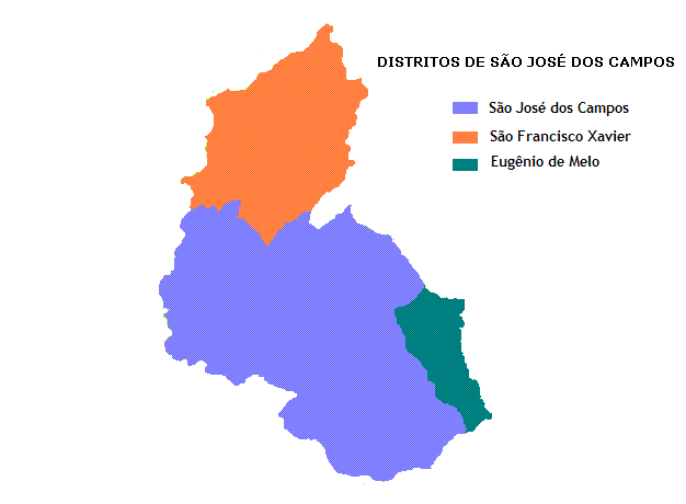 Distritos de SÃ£o JosÃ© dos Campos. Adaptado de pt::en:Image:Distritossjcn.GIF